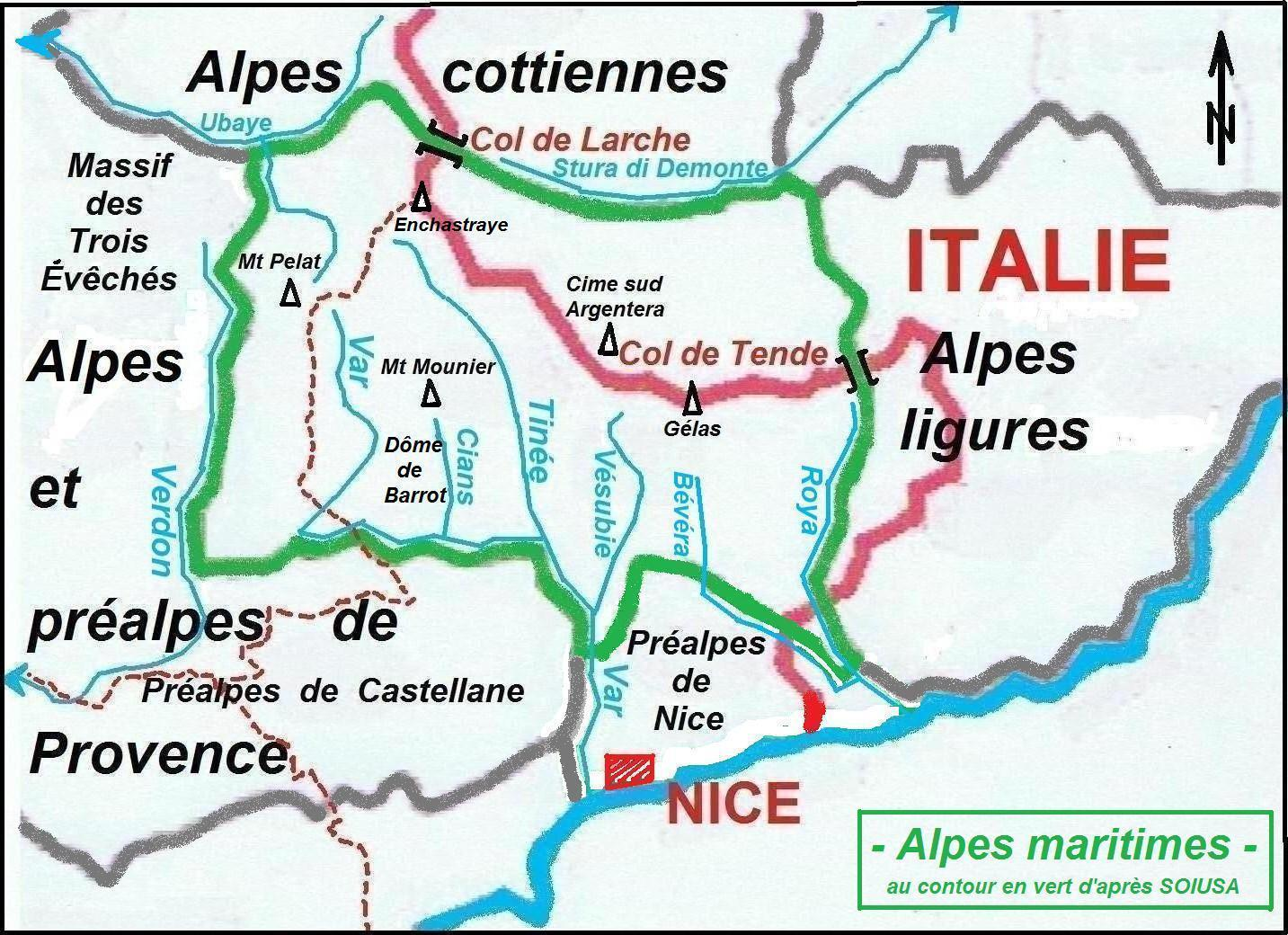 Secteur alpin des "Alpes maritimes" (au contour en vert) défini par la SOIUSA (Subdivision orographique internationale unifiée du système alpin). Réalisation cartographique réalisée par André Payan-Passeron - diplômé d'études supérieures de géographie - les 8 et 11 février 2013.